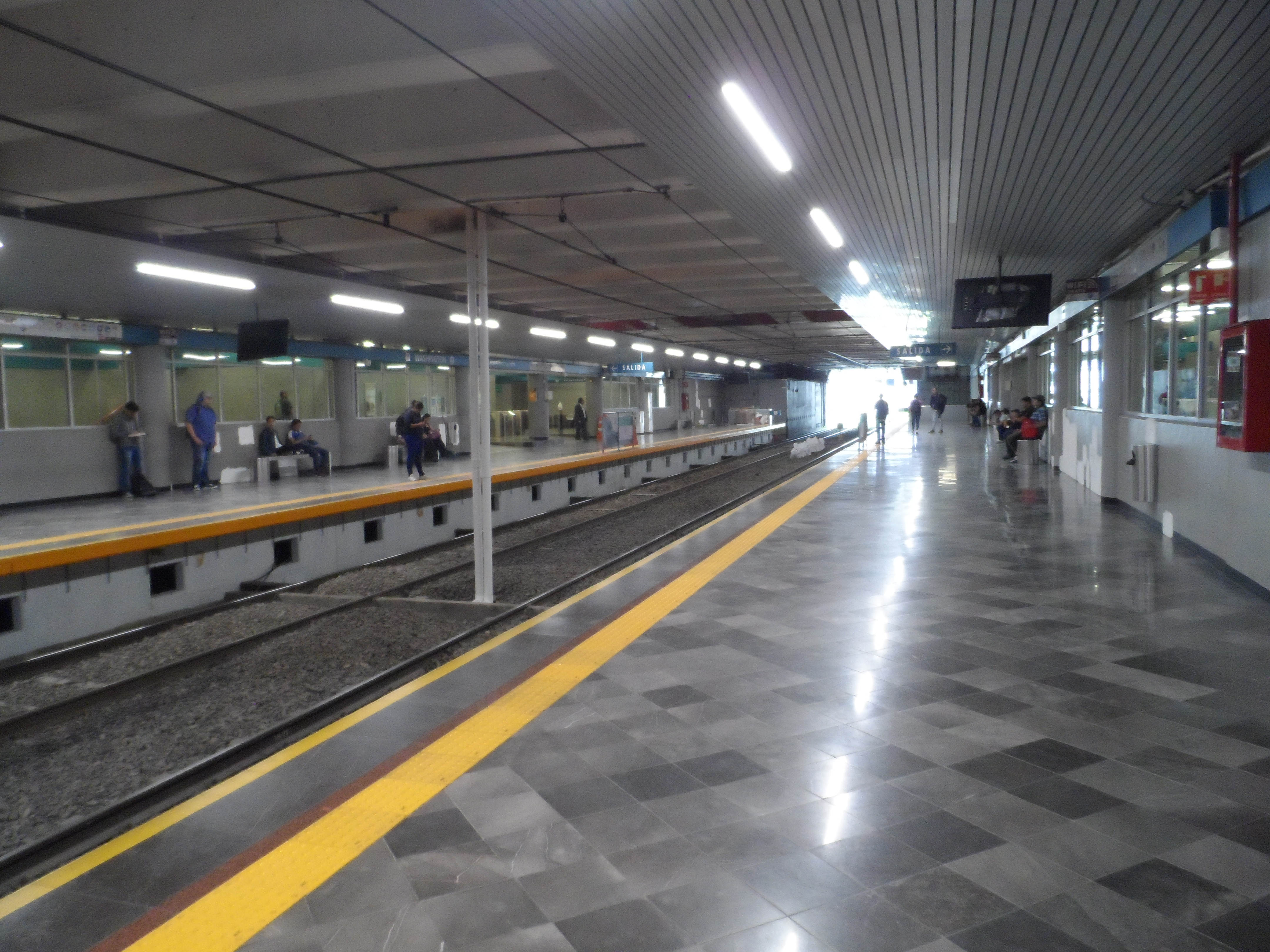 Andenes de la estación "Washington" de la Línea 1 del Tren Ligero de Guadalajara. Hacia el fondo se aprecia la salida del túnel principal de dicha línea.